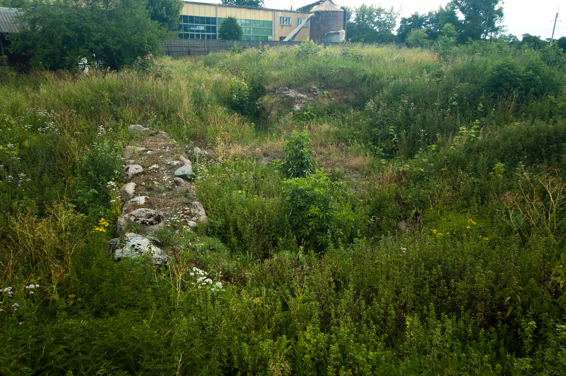 Ruiny zamku Szczuków, mur., XVII/XVIII Szczuczyn, Szczuczyn 12.1964.